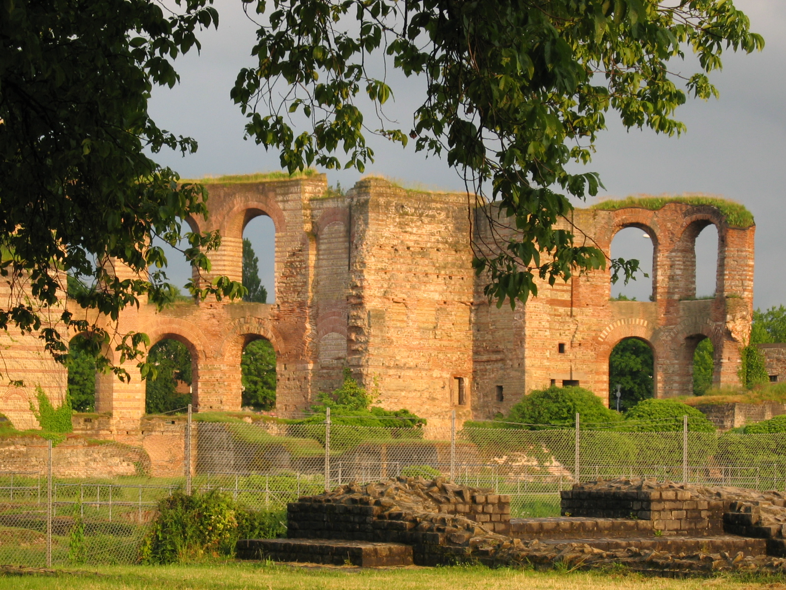 Kaisertherme in Trier